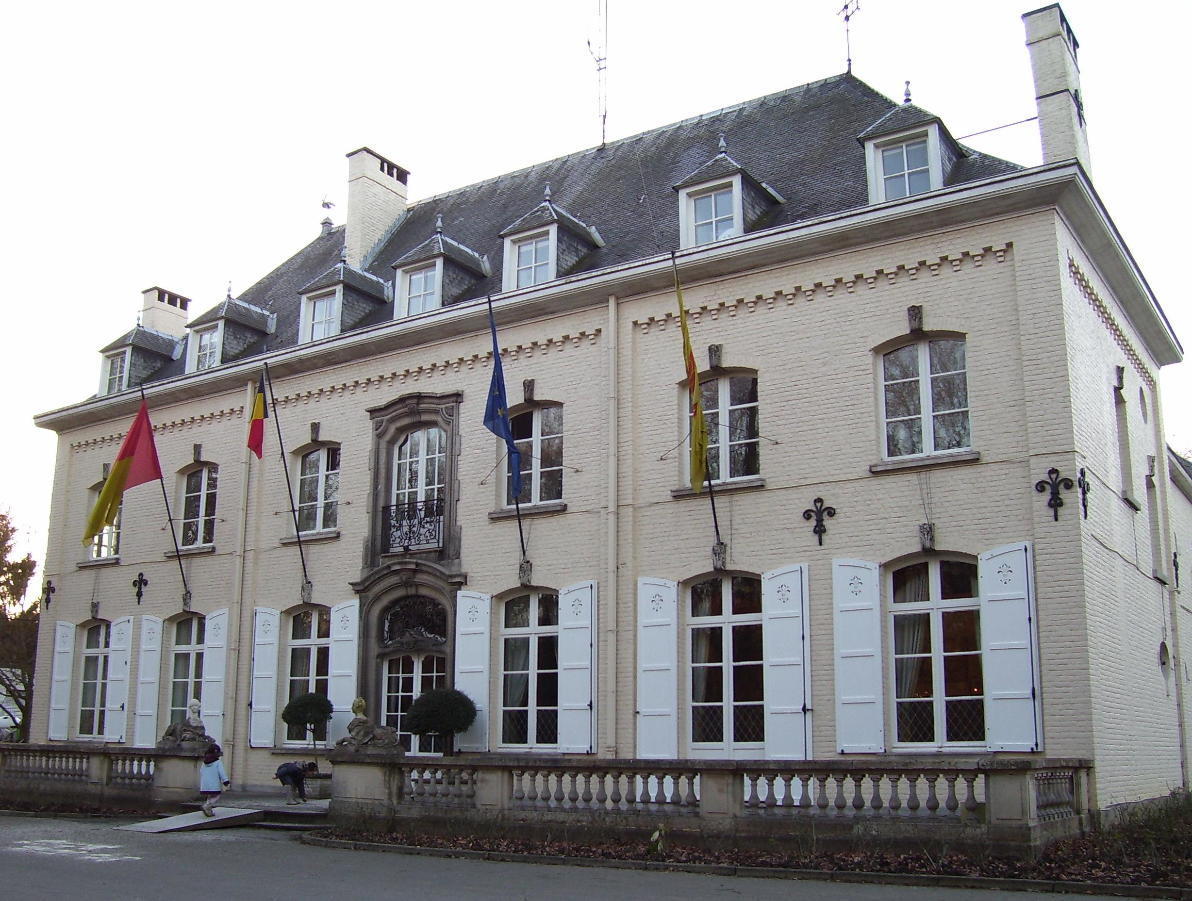 Château du Héron, since 1977 Maison Communale (municipality) of Rixensart, Belgium